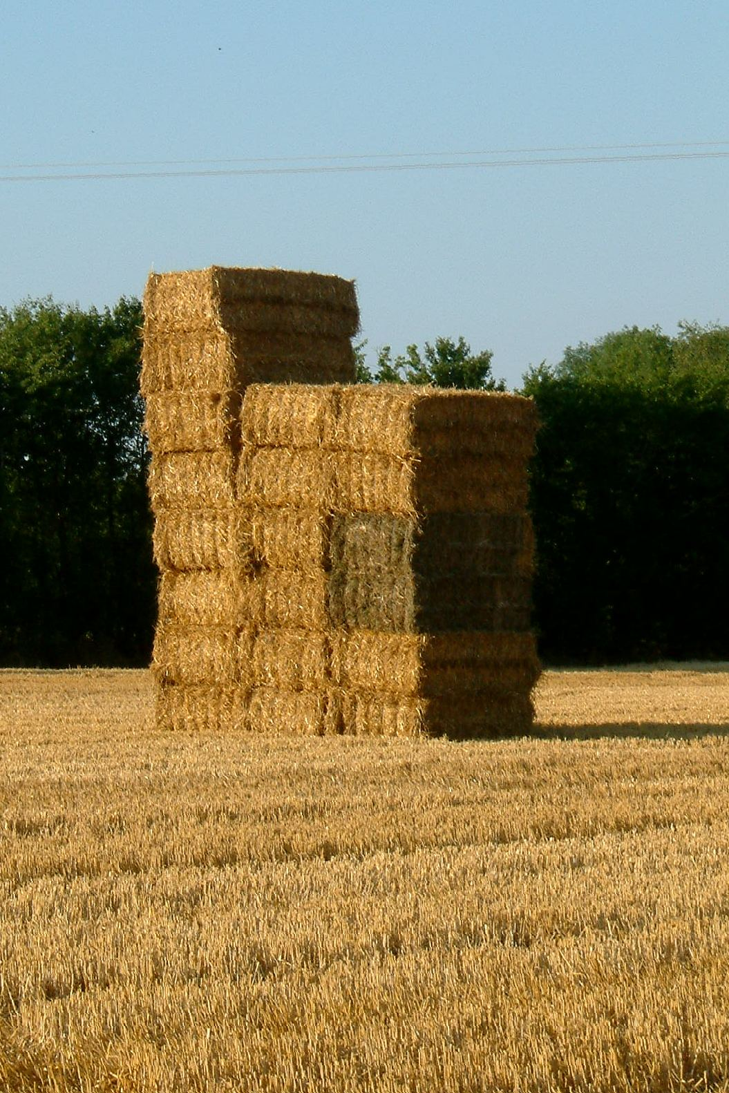 Paille. Date : juillet 2005. Auteur : Christophe.Finot